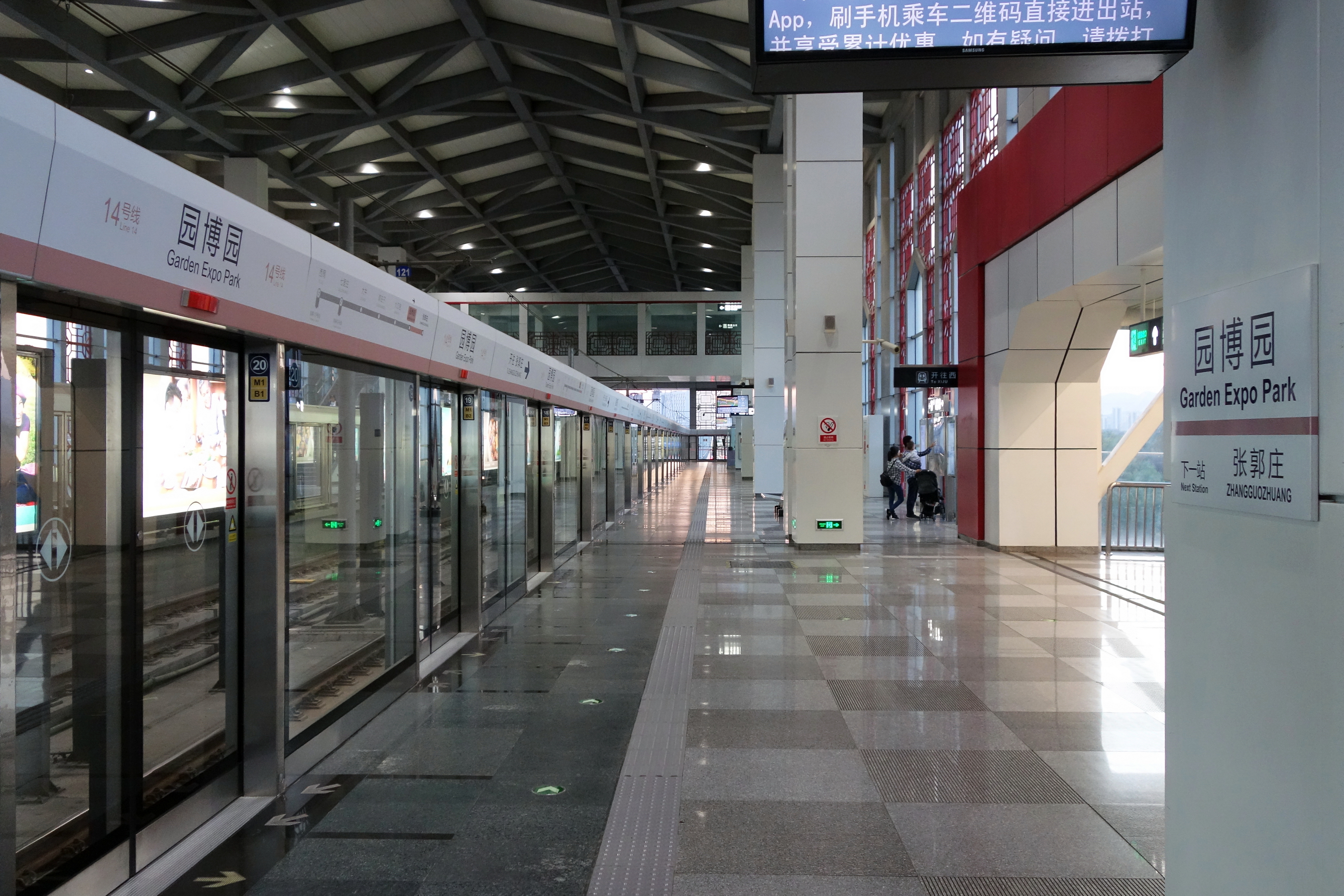 北京地铁14号线园博园站高架侧式站台